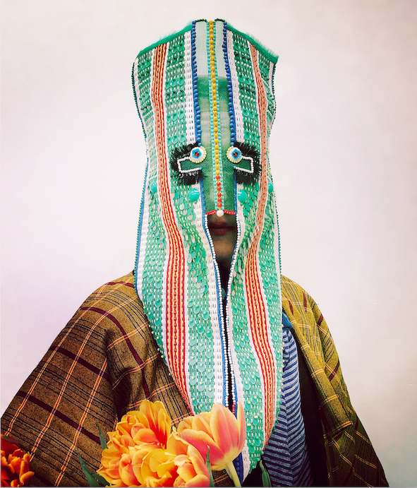 Maske, wearable art, laget av Magnhild Kennedy, kunstnernavn Damselfrau